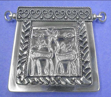 Współczesna, wykonana ze srebra, replika kaptorgi z X-XIw. Znalezisko z Chełmu Drezdeneckiego X- XIw. Wymiary 5,8 cm x 5,5 cm Wykonane ze srebra próby 925 Autor wyraził zgodę na zamieszczenie tej grafiki w wikimedia commons. Zdjęcie pochodzi ze strony .pl